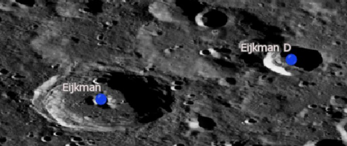 Cráter lunar Eijkman. Cráteres satélite (Imagen LRO)